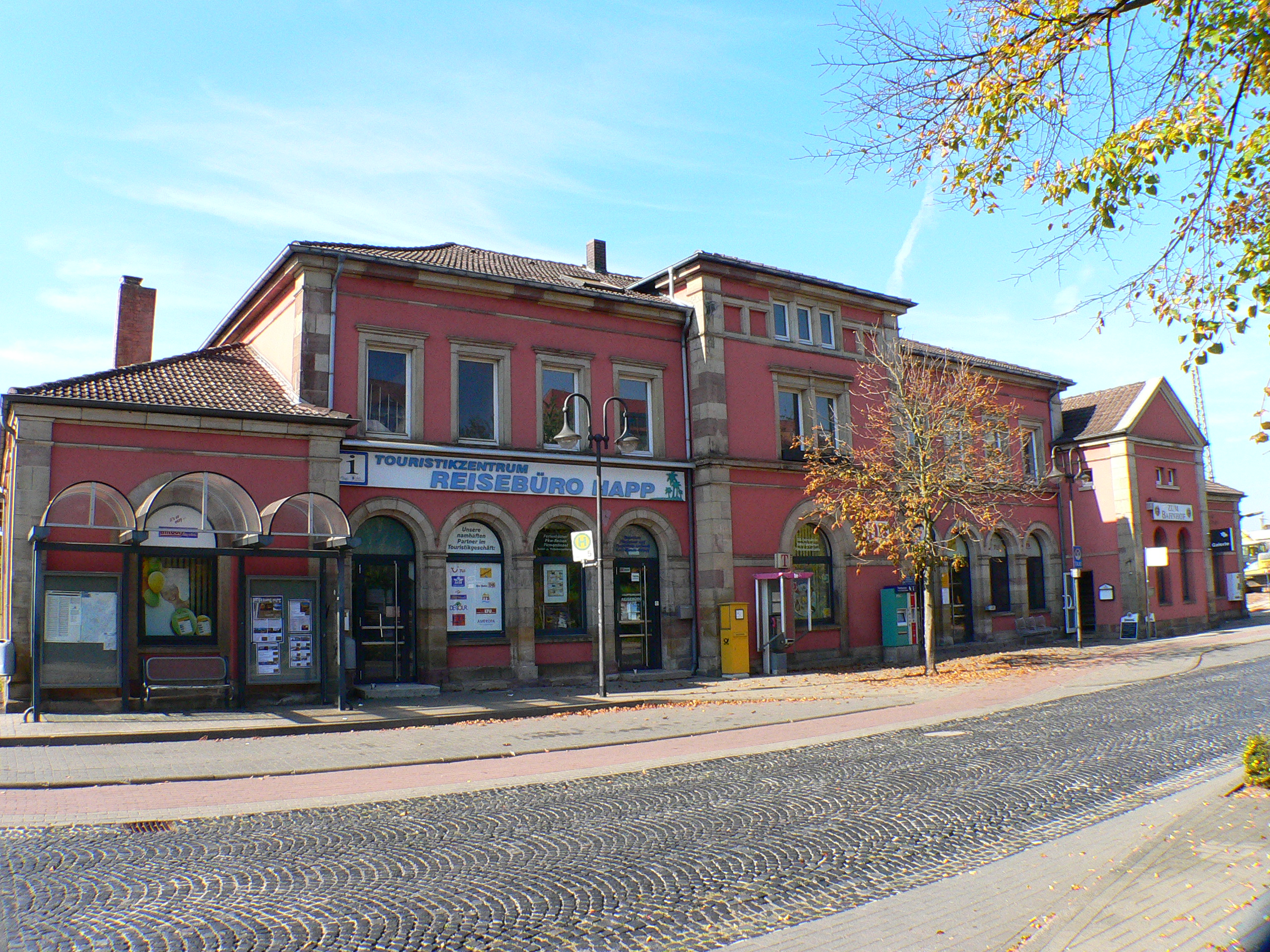 Ehemalige Rhön-Bahnstrecke „Hünfeld-Wenigentaft“: Abzweig-Bahnhof Hünfeld.